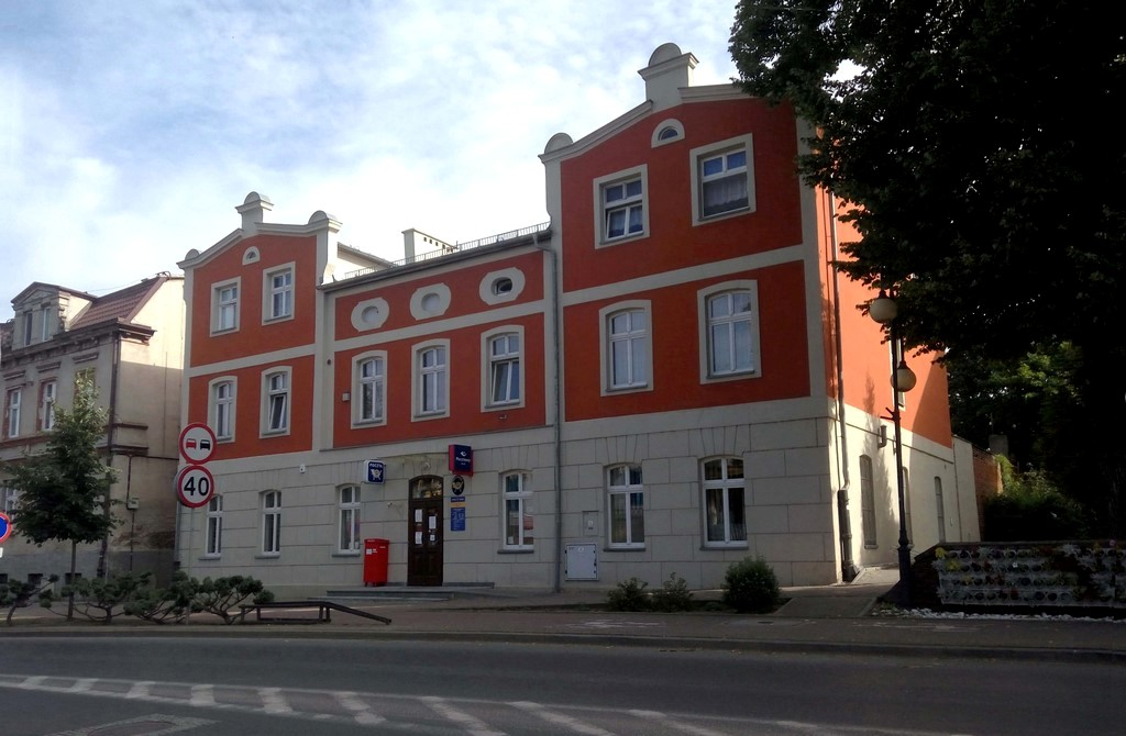 Budynek poczty w Pelplinie